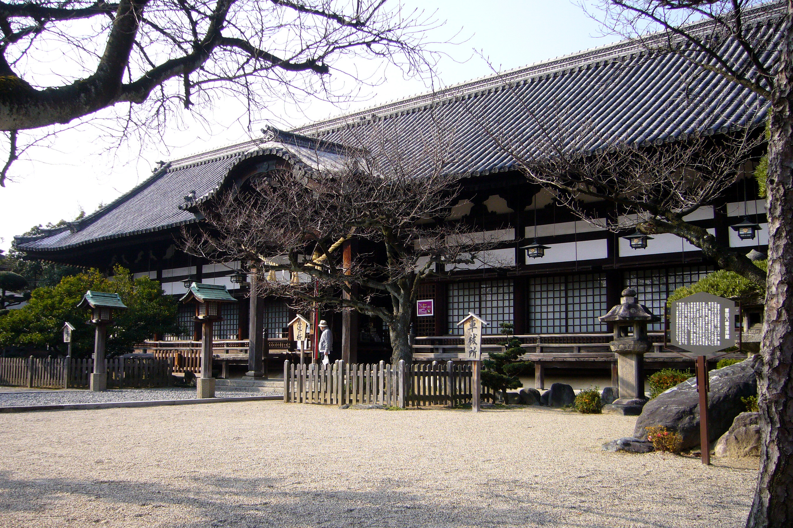 Konda-hachimangu, Habikino, Osaka, Japan